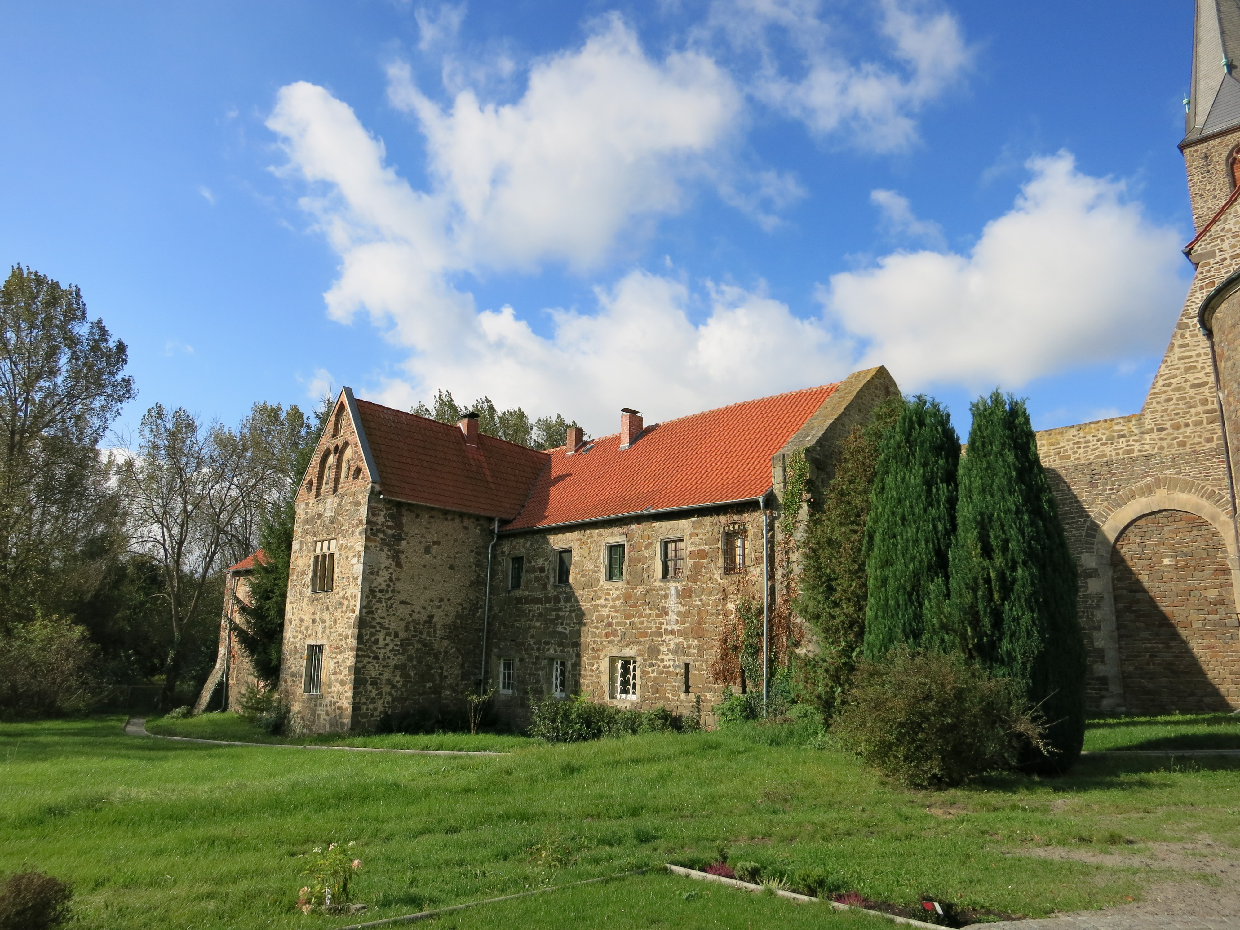 Kloster Hillersleben